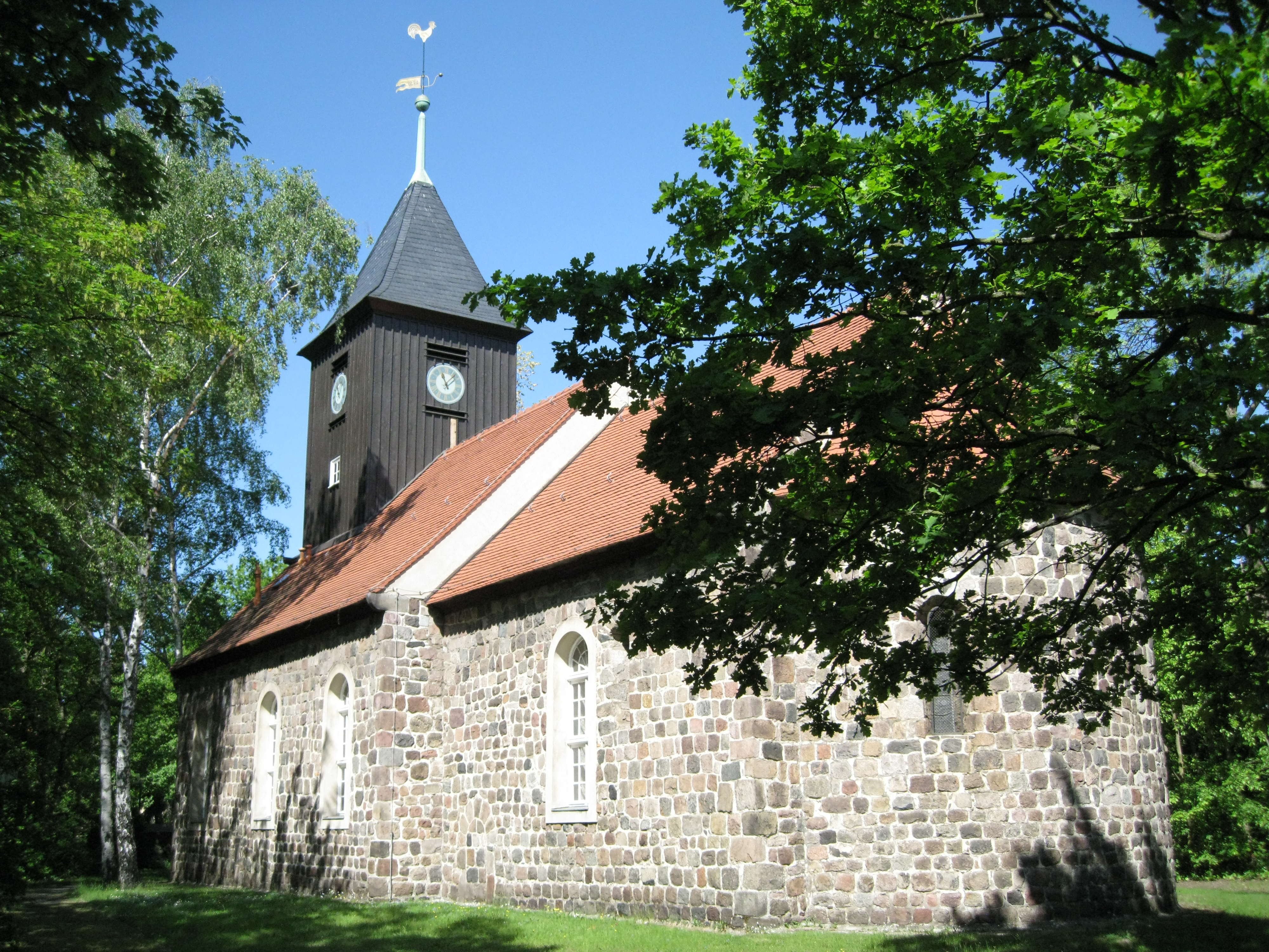 Dorfkirche Lankwitz, fotografiert von Südost, Kirchenschiff Chor und Apsis